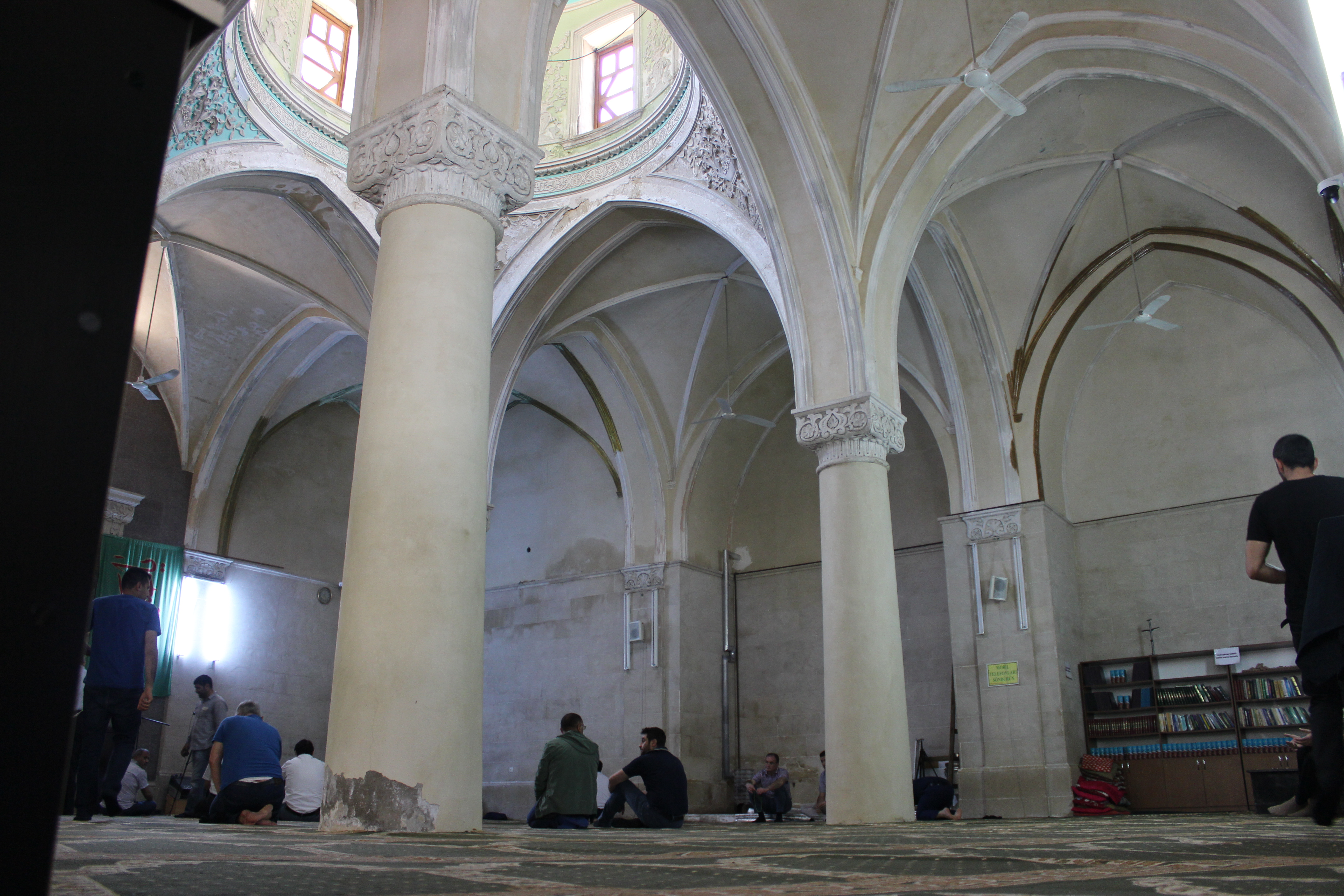 Qasım bəy məscidinin daxili